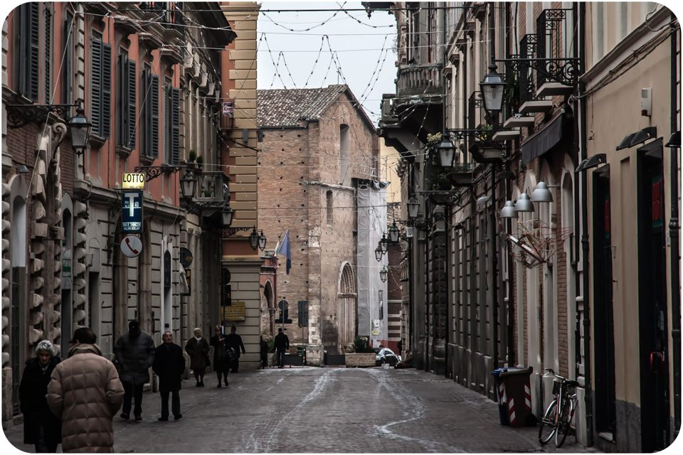 corso Cerulli, Teramo